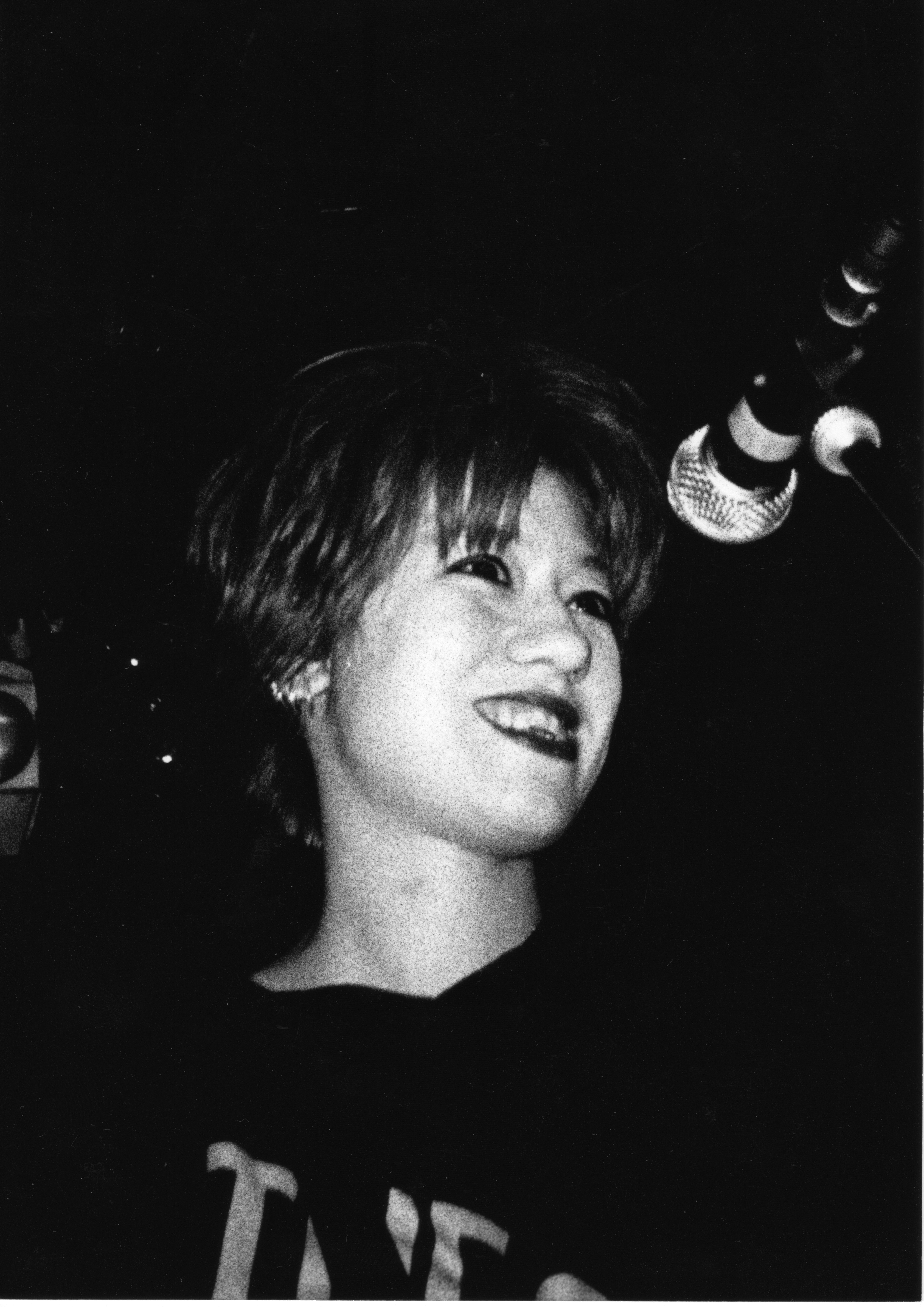 Miki Berenyi du groupe Lush. Concert à Rennes, Avril 1990